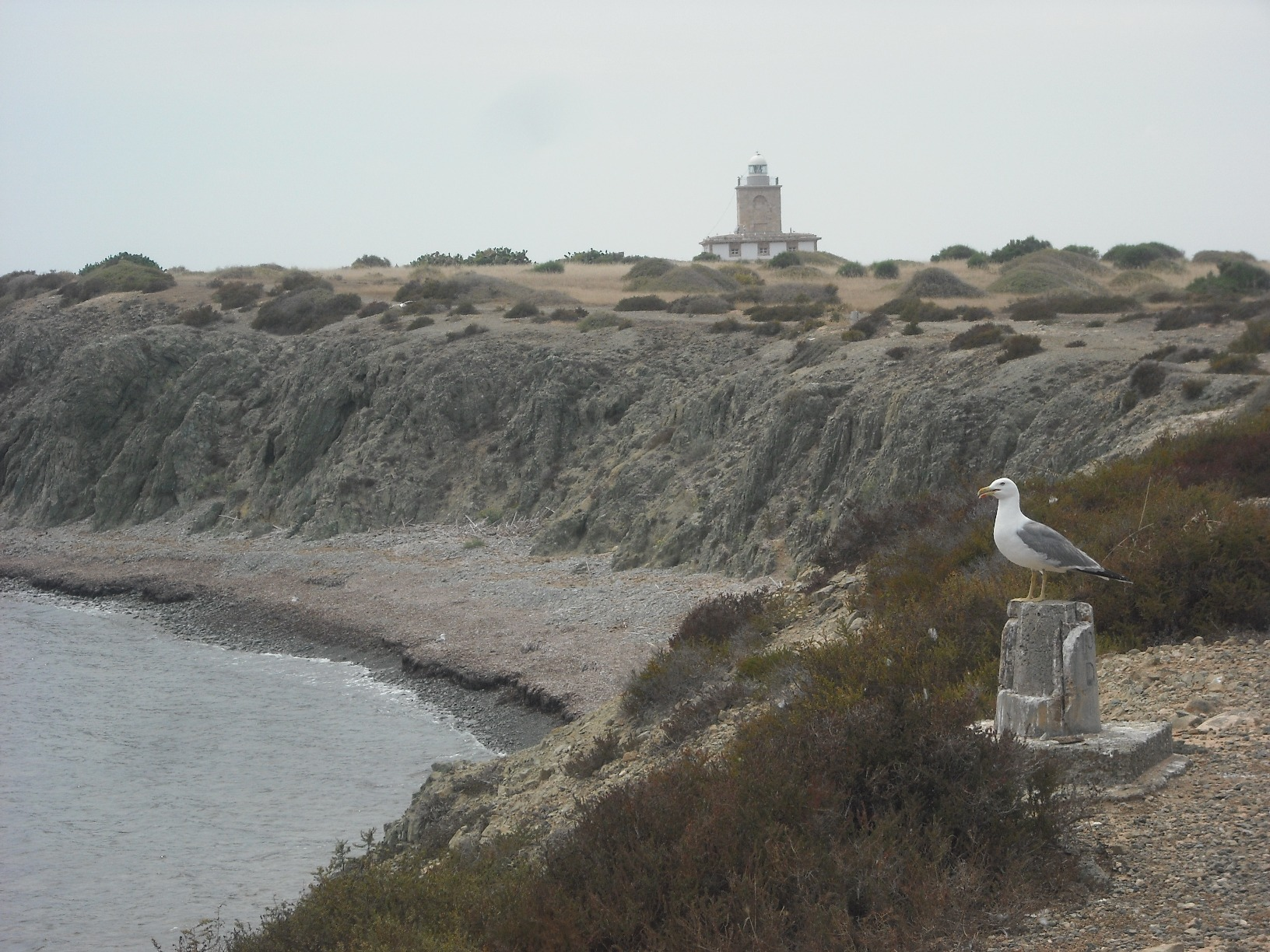 Platja Gran.